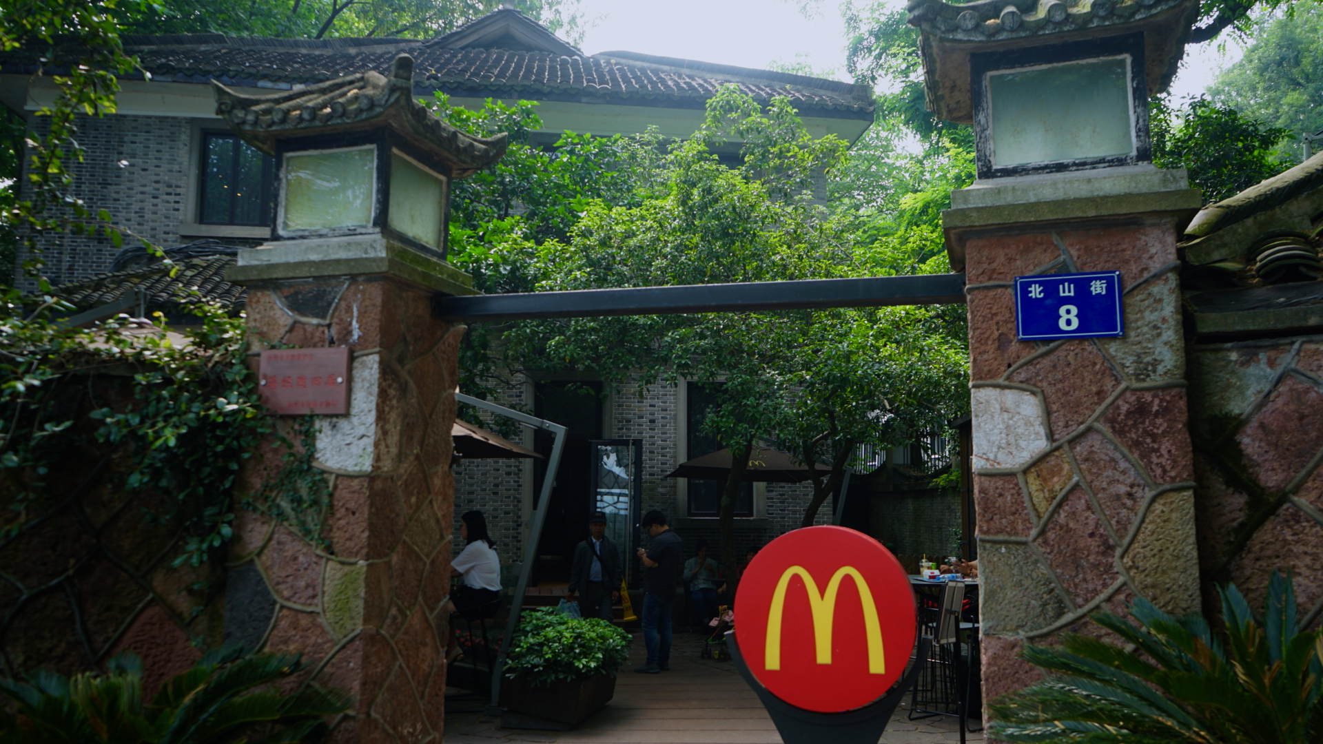 中文（中国大陆）: 杭州蒋经国旧居东侧门